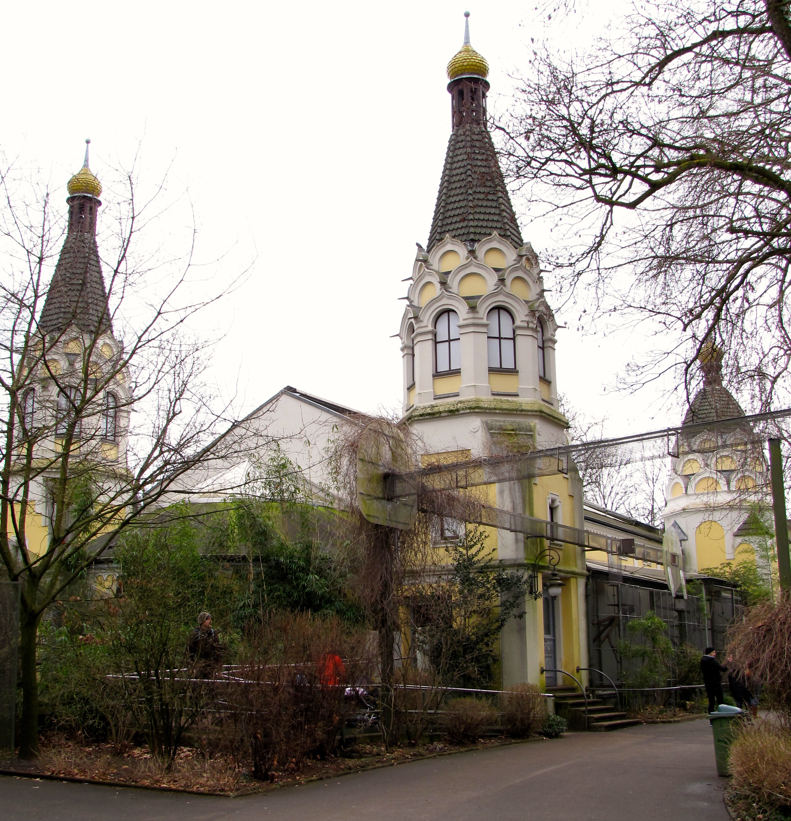 Kölner Zoo: Historisches Vogelhaus (1899). Architekturbüro: Müller & Grah. Inspiriert von orthodoxen Kirchen im russischen Stil. Zwiebeldächer der Ecktürme frei der Basiliuskathedrale Moskau und der Auferstehungskirche St. Petersburg nachempfunden.